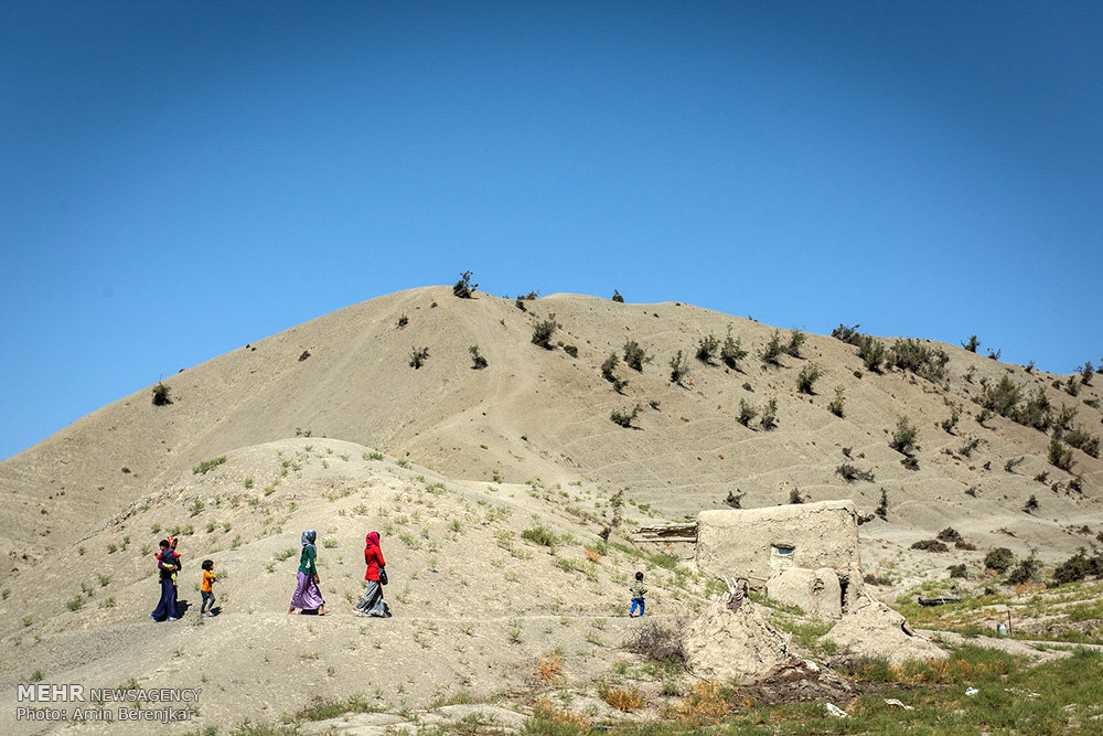 روستای کالشور از توابع کالیمانی بخش مانه و سملقان استان خراسان شمالی است(در زبان محلی کال به معنی چشمه، و کالشور به معنی چشمه شور است). مسیر صعب العبور آن با عبور از روستای کالیمانی و بعد از آن عبور از یک جاده ناهموار (که در فصل بارش کاملا غیر قابل عبور است) ممکن می شود. روستای کالشور با حدود ۲۵ خانوار از کلیه امکانات رفاهی شامل آب، برق، گاز و حتی دسترسی مخابراتی محروم است. محل تامین آب روستا چشمه ای با آب غیر بهداشتی در نزدیکی روستا است. عده ای از ساکنین روستا محل زندگی خود را ترک و یا به صورت فصلی مهاجرت کرده اند، اما بسیاری از خانوارهای روستا علیرغم نبود امکانات رفاهی و بهداشتی و نداشتن کار و امکان معیشت همچنان در محل فعلی زندگی خود مانده اند و عده ای دیگر از روستاییان برای تامین زندگی و استفاده دامهایشان از مراتع اطراف محل زندگی به شغل دامداری مشغول هستند.